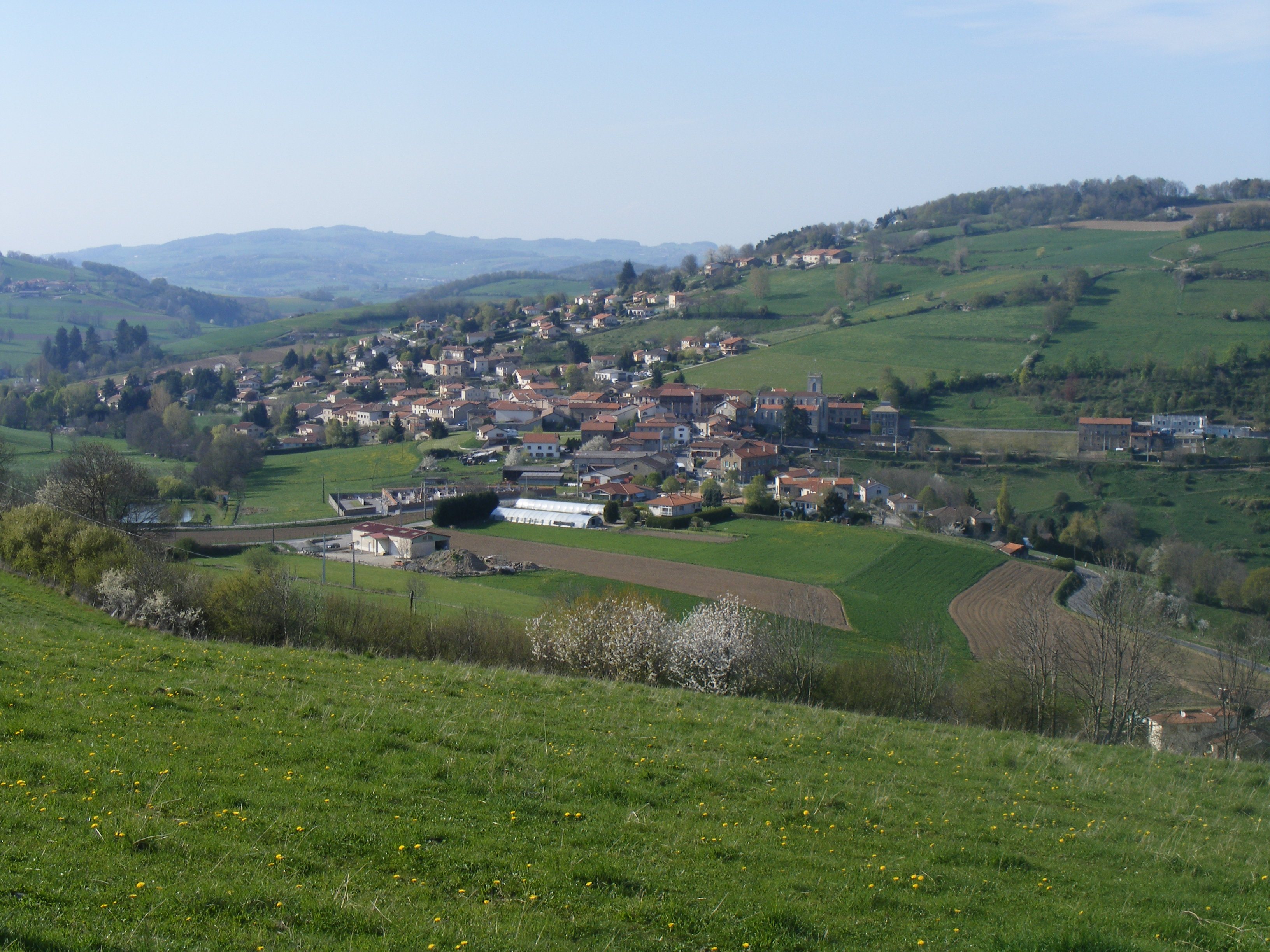 Vue générale vers l' ouest depuis le sommet du Châtelard